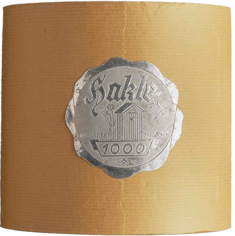 Eine Abbildung der ersten Rolle mit garantiert 1000 Blatt pro Rolle